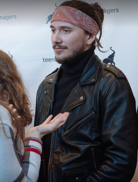 M. H. Murray at a screening in 2017